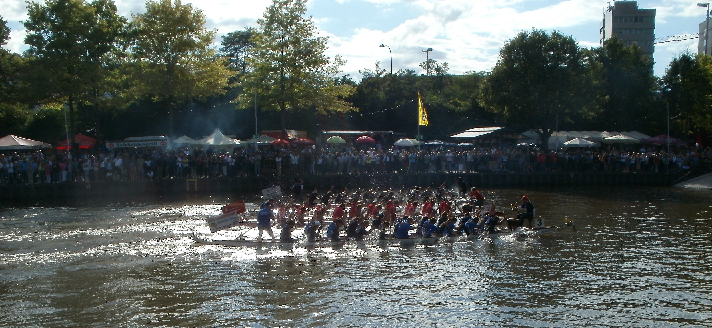 Drachenbootrennen beim Saarspektakel 2011 in Saarbrücken